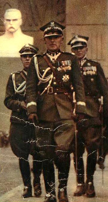 Edward Śmigły-Rydz podczas uroczystości 6 sierpnia 1939 w Krakowie